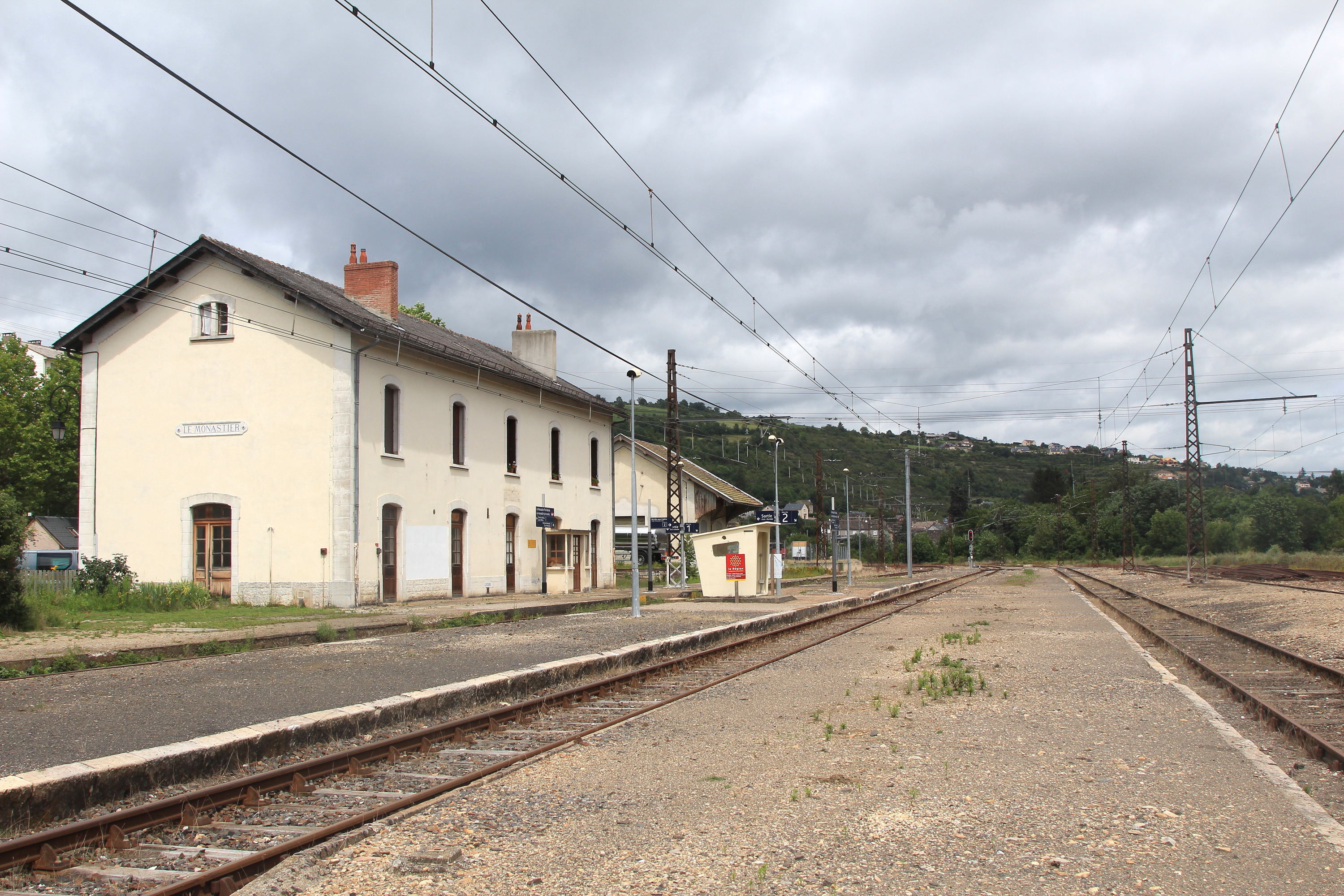 Vue générale de la gare du Monastier côté voies.